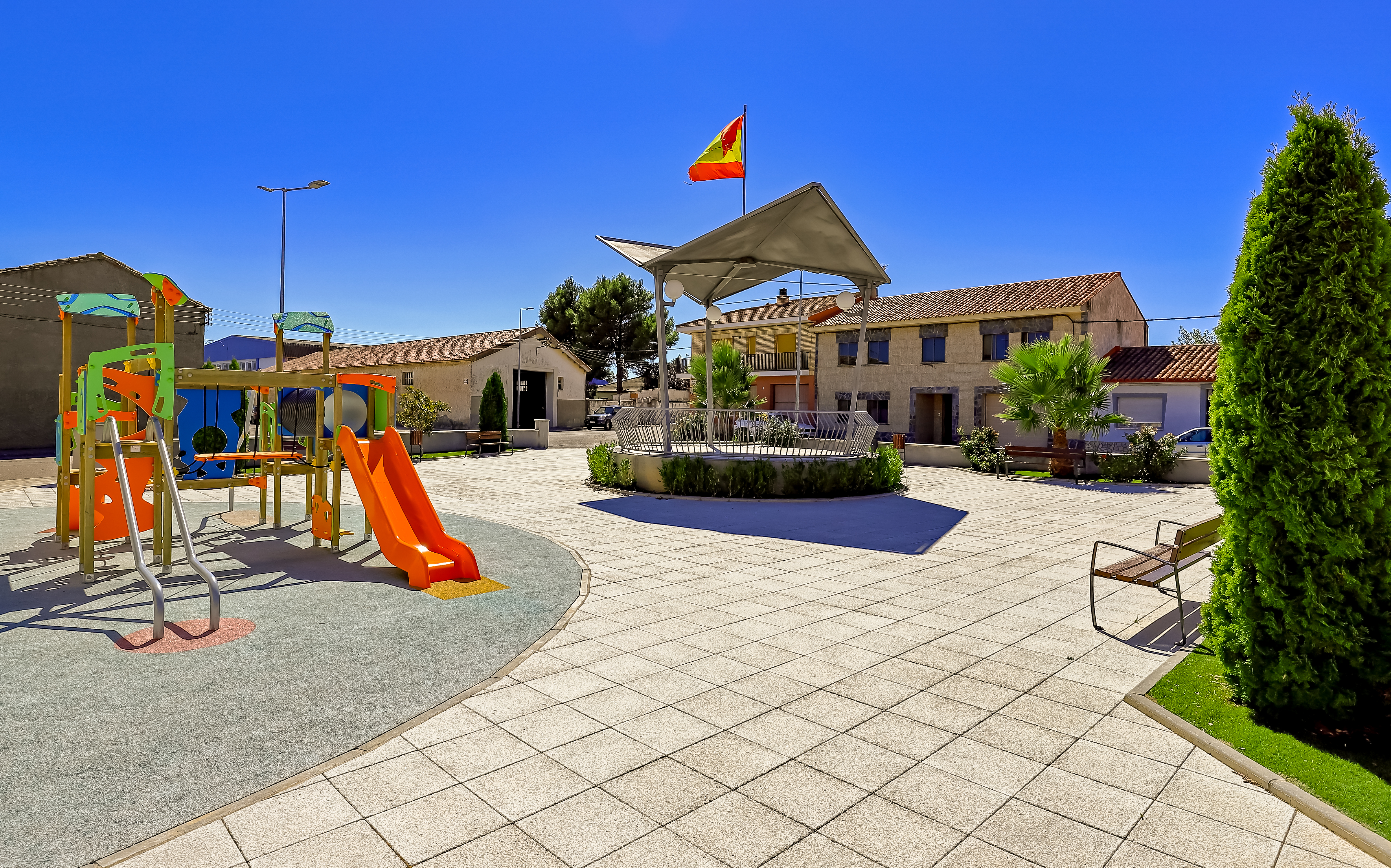 Gurrea de Gállego es un municipio de la comarca Hoya de Huesca, en la provincia de Huesca.